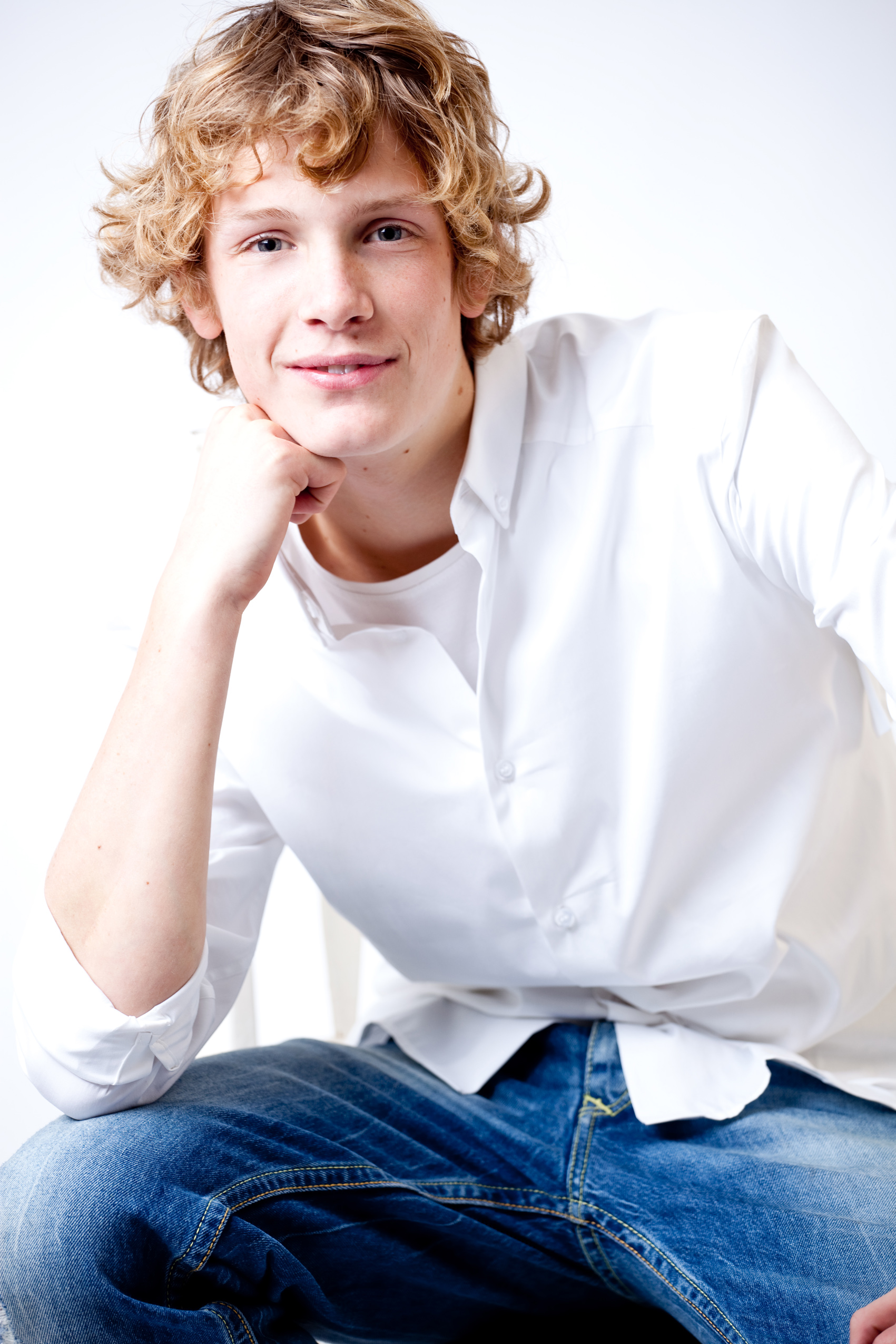 Martijn Lakemeier (Zwijndrecht, 17 september 1993) is een Nederlands acteur.